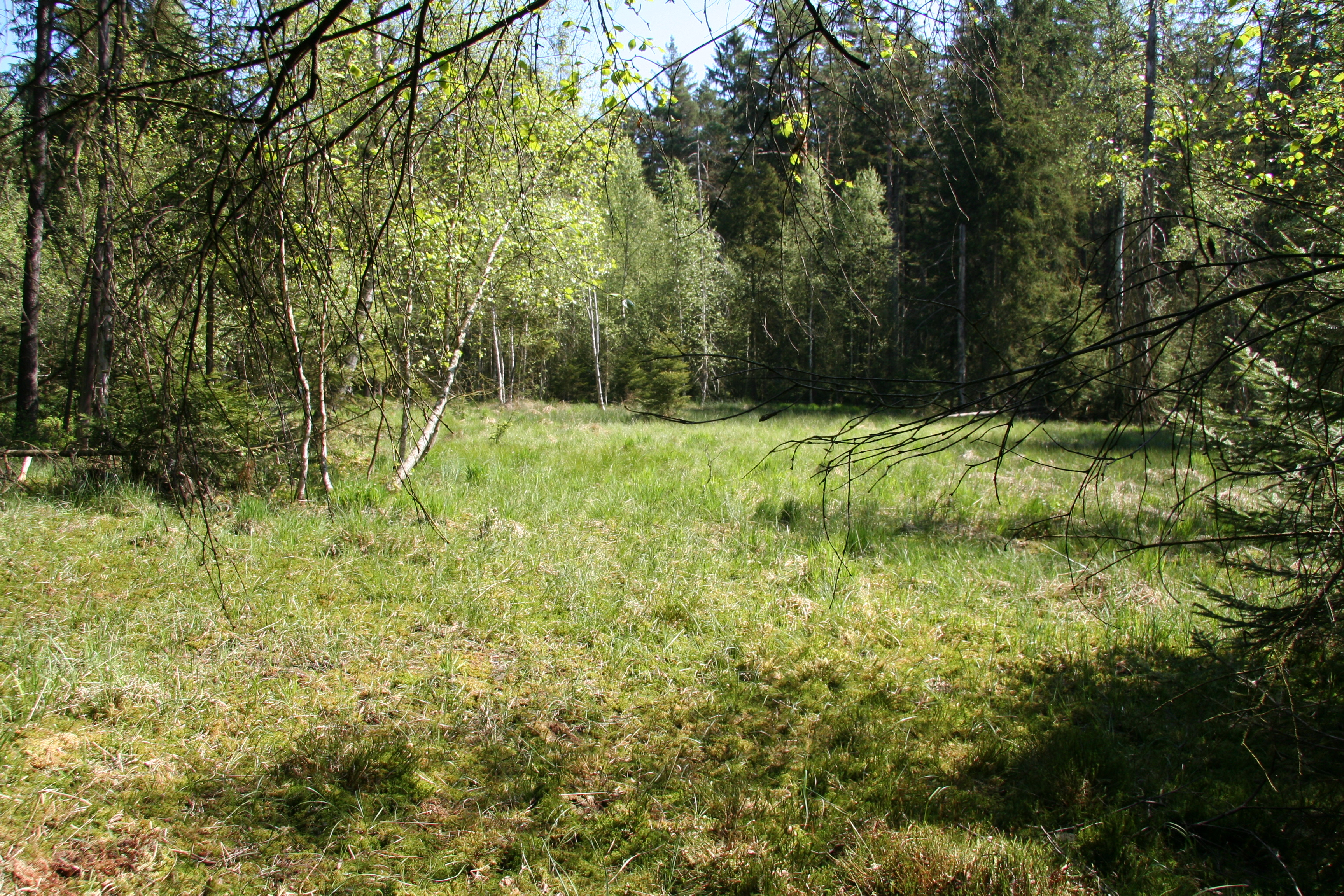 im Naturschutzgebiet "Moor an der Roten Pfütze", Erzgebirgskreis